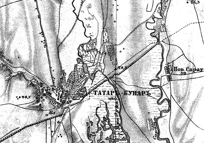 Татарбунары. Фрагмент карты работы Ф. Ф. Шуберта. Из комплекта топографических карт Бессарабская губерния. 1860-1890 гг. Масштаб: 3 версты в дюйме. (1 см-1260м) .(1:126000)